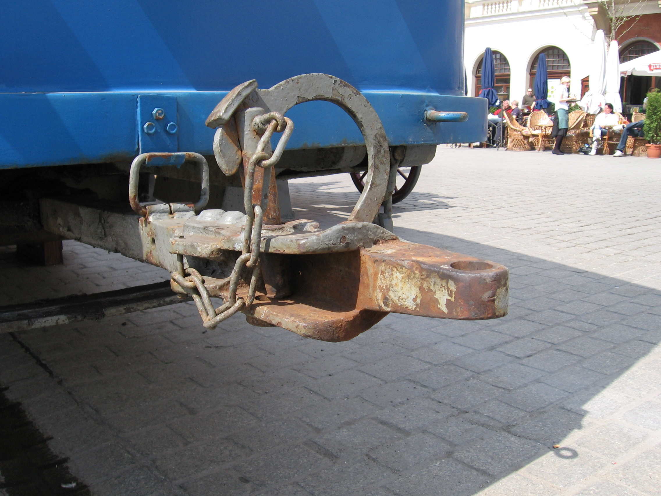 Sprzęg tramwajowy Alberta w tramwaju typu N